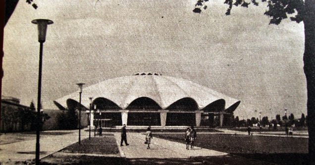 Cladirea Circului